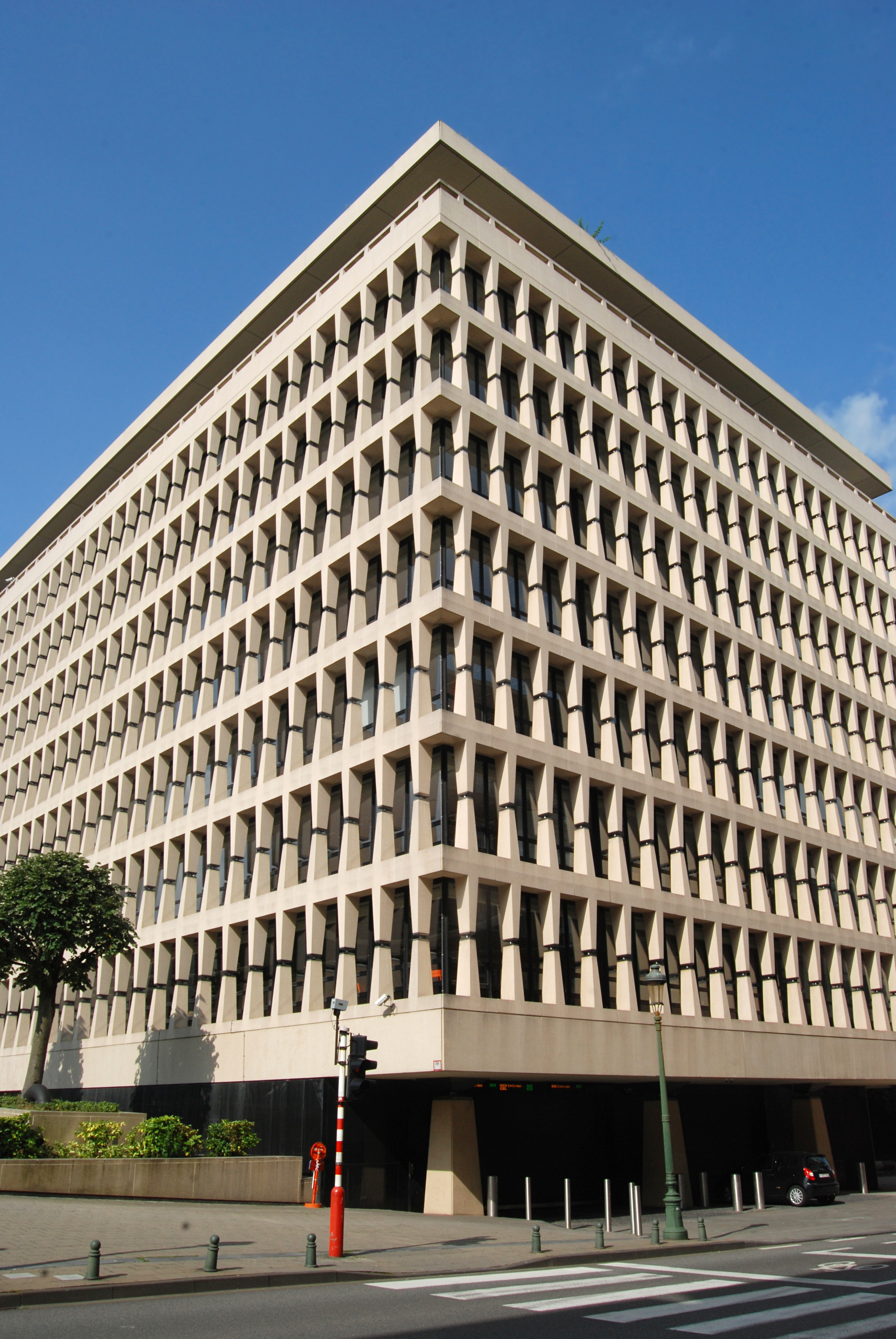 Belgique - Bruxelles - Siège de la Banque Lambert, devenue Banque Bruxelles Lambert ou BBL, absorbée plus tard par ING (Architecture fonctionnaliste - Gordon Bunshaft - 1956-1960)